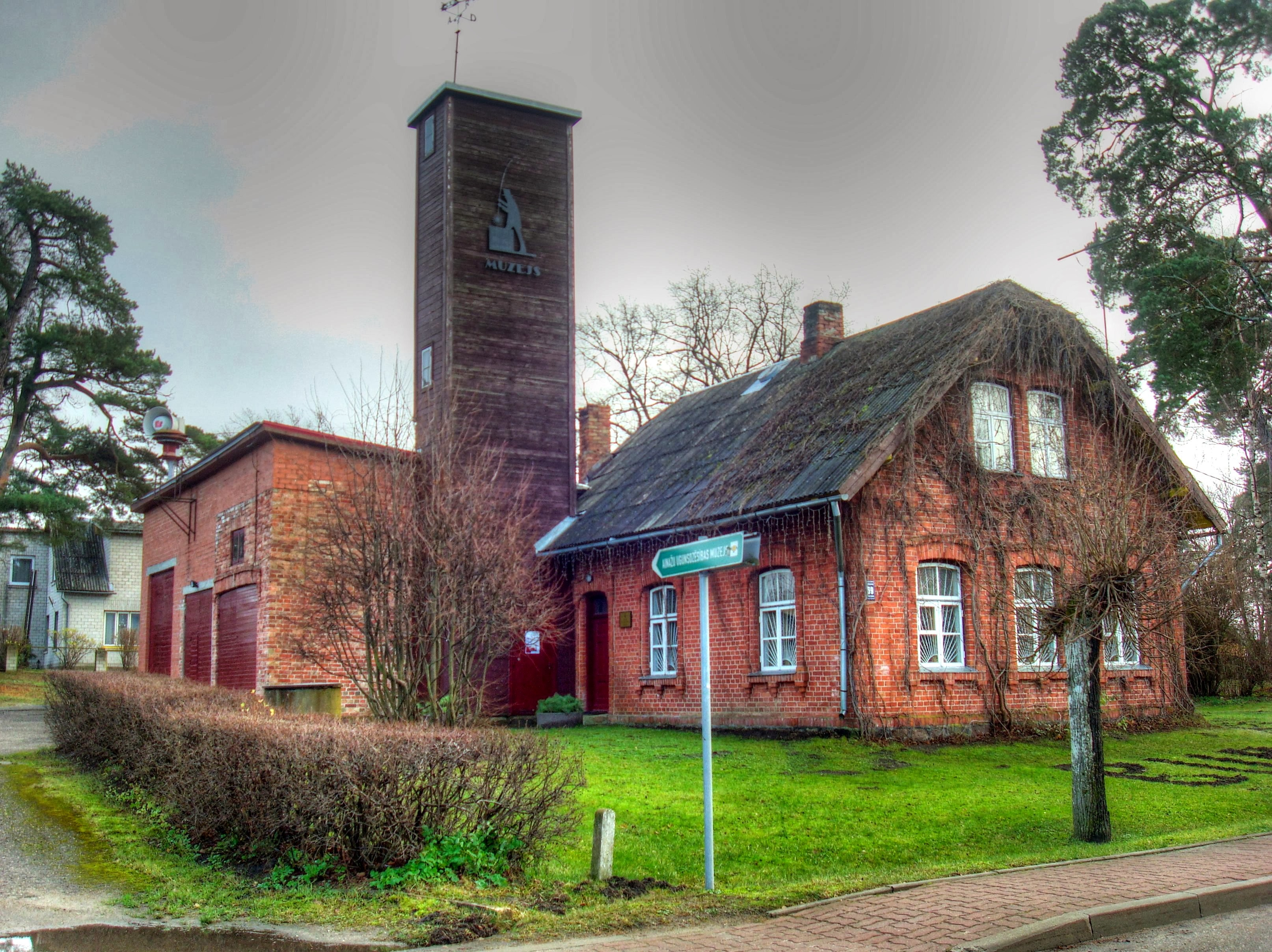 Ugusndzēsības muzejs